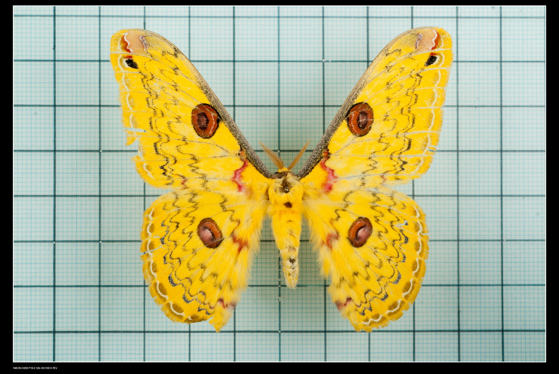 Loepa formosensis